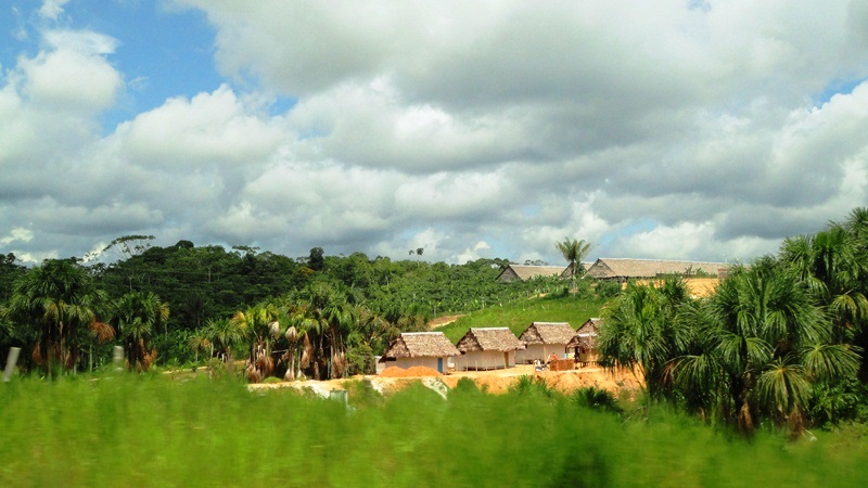 Poblado en Iquitos Metropolitano